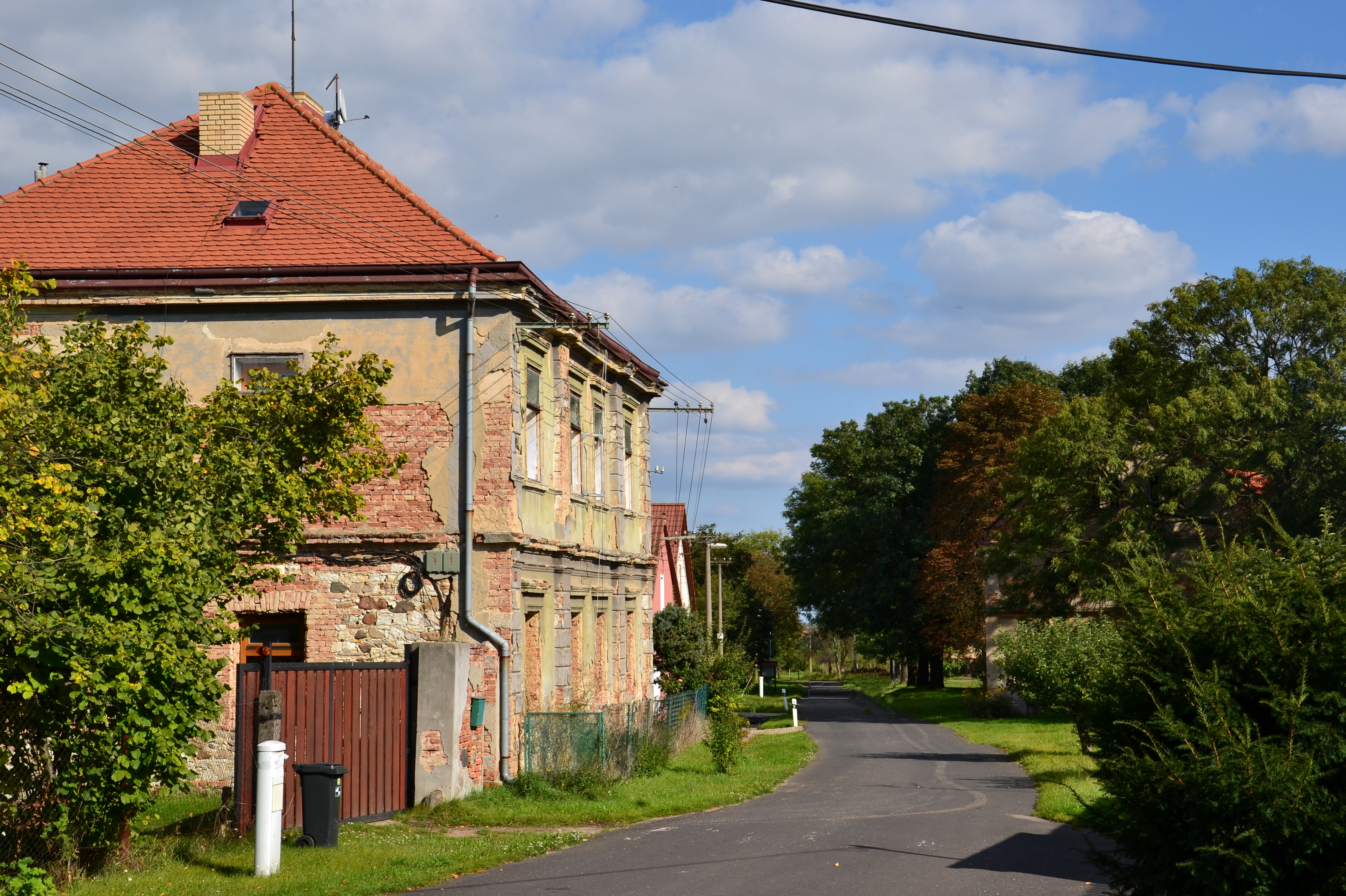 Přeskaky